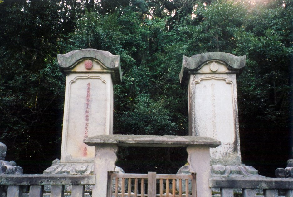 山口県萩市東光寺毛利家墓所内にある毛利吉就と夫人の亀姫の墓。同寺は江戸時代、長州藩主毛利吉就によって創建され、以後毛利家の菩提寺となった。